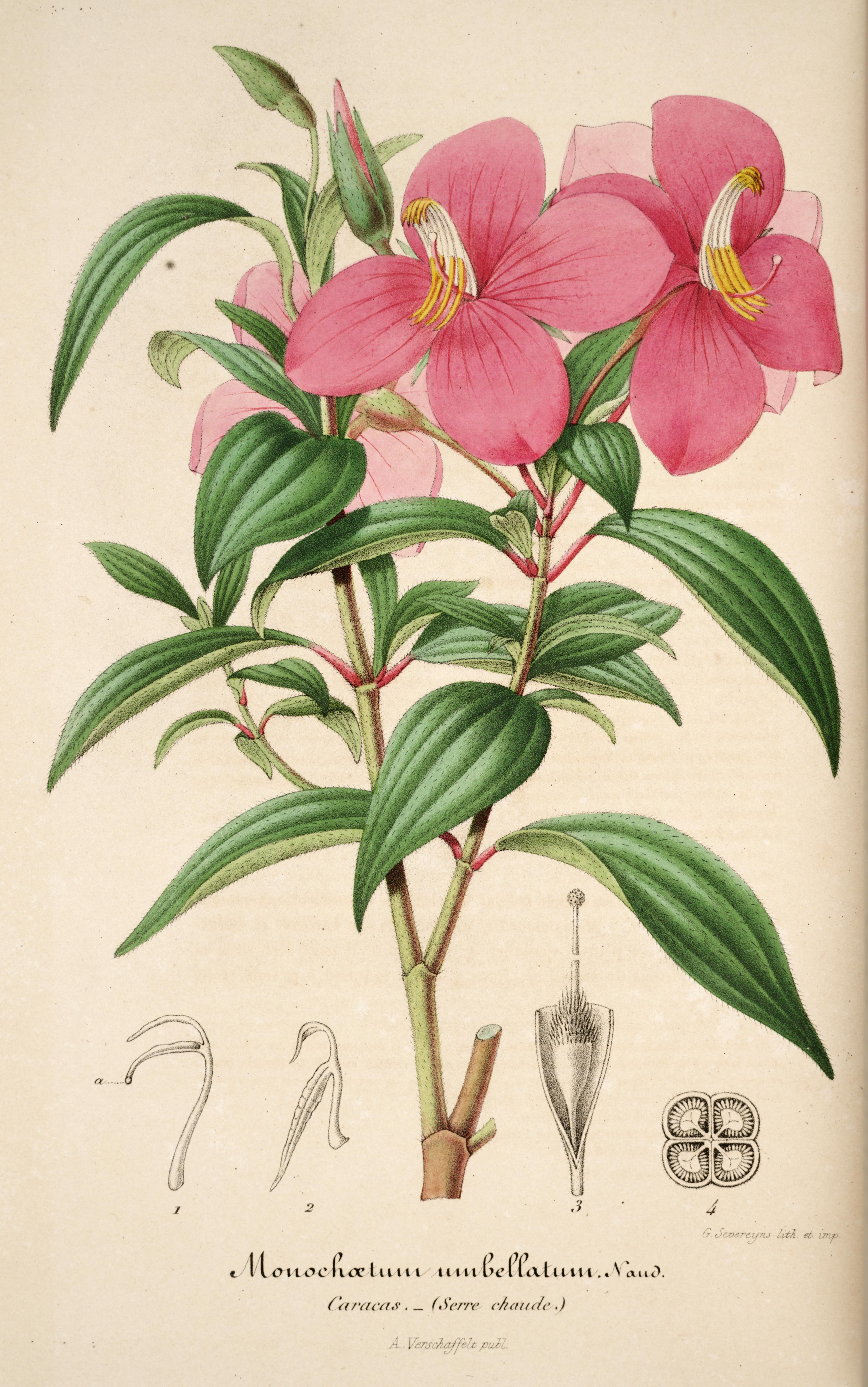 L'Illustration horticole : journal spécial des serres et des jardins, ou choix raisonné des plantes les plus intérressantes sous le rapport ornemental, comprenant leur histoire complete, leur description comparée, leur figure et leur culture /